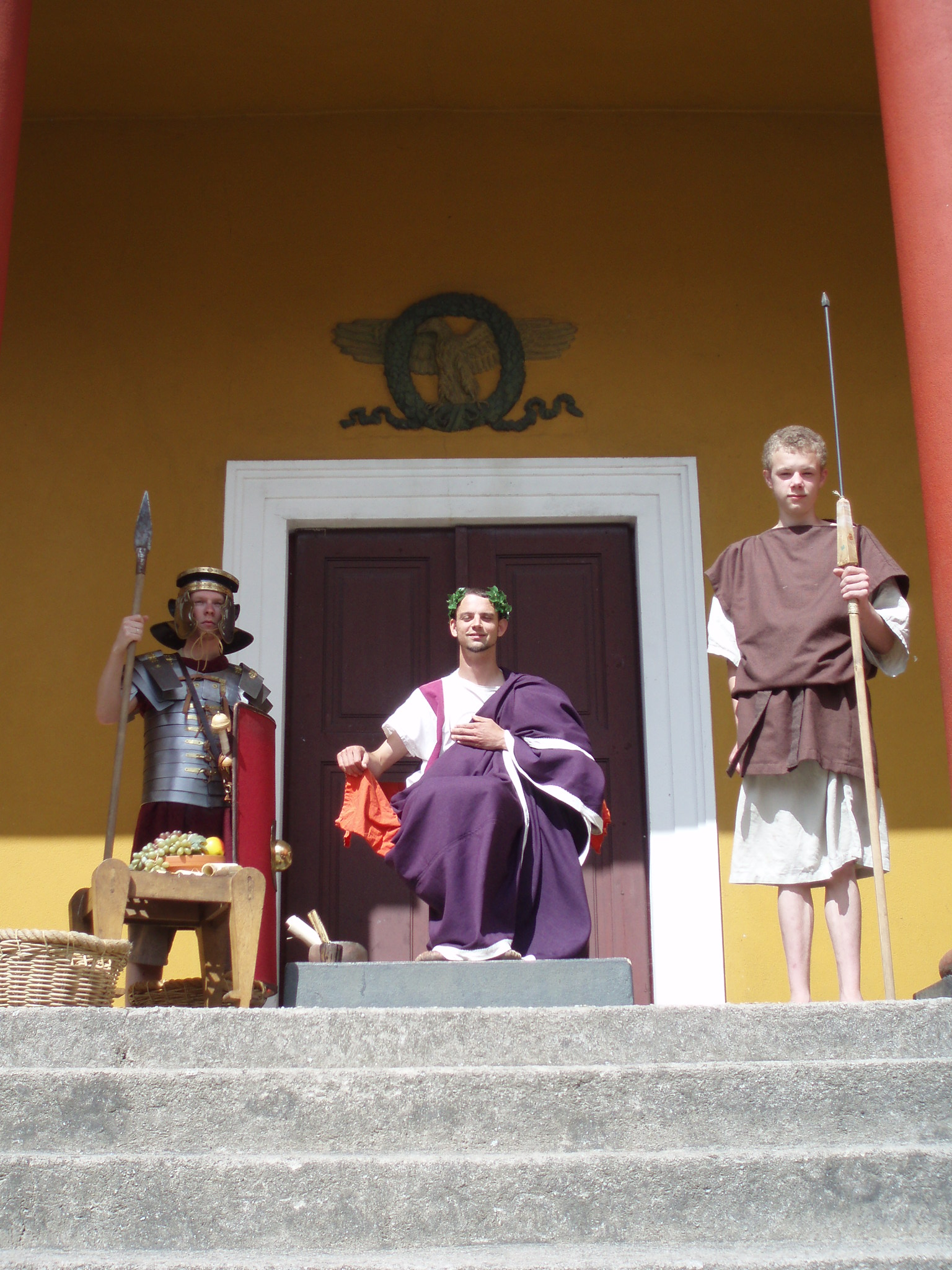 Keizer Traianus tijdens een bezoek. Figuranten Bijbels Museumpark Orientalis